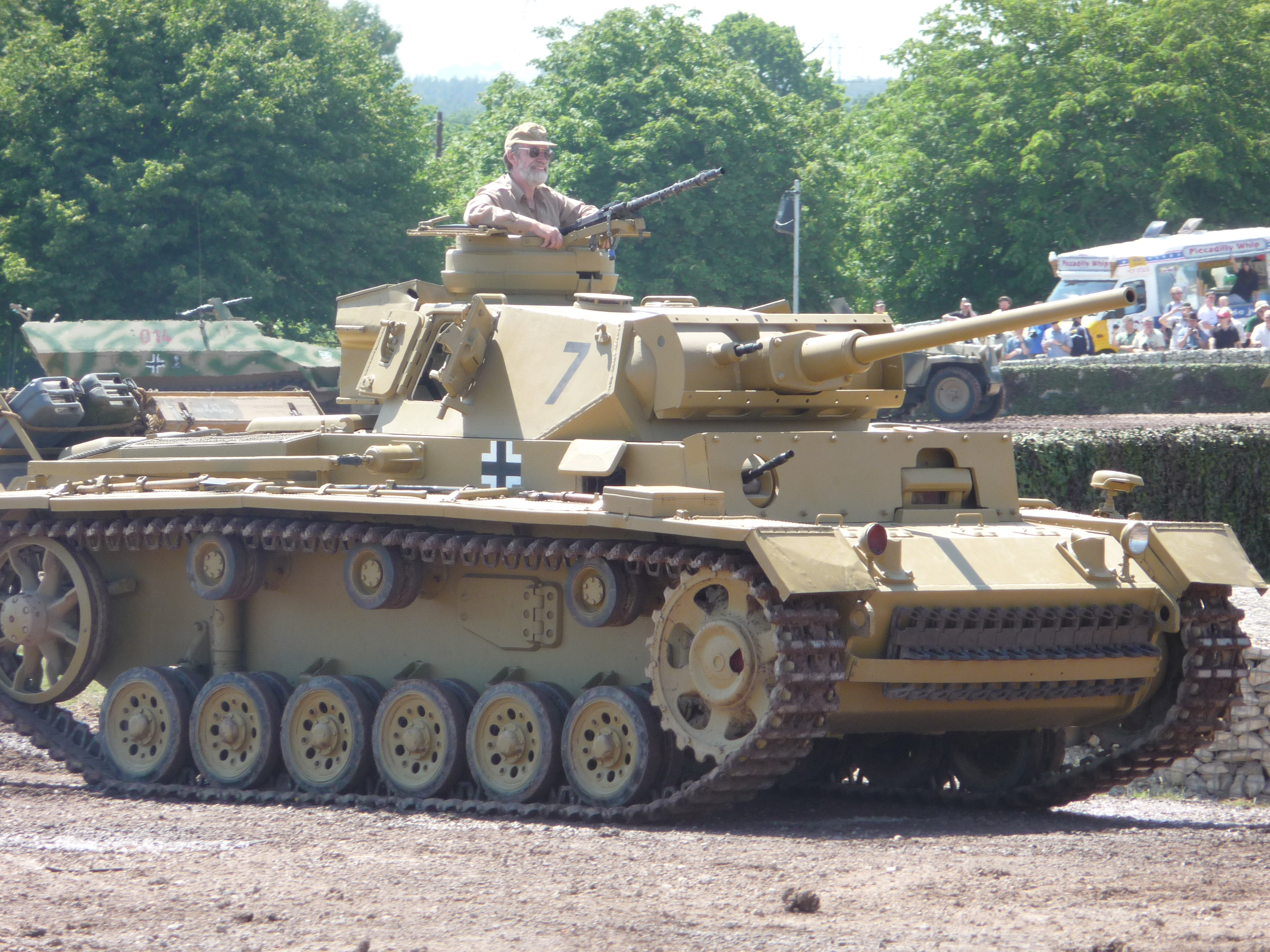 Panzer 3 (III)